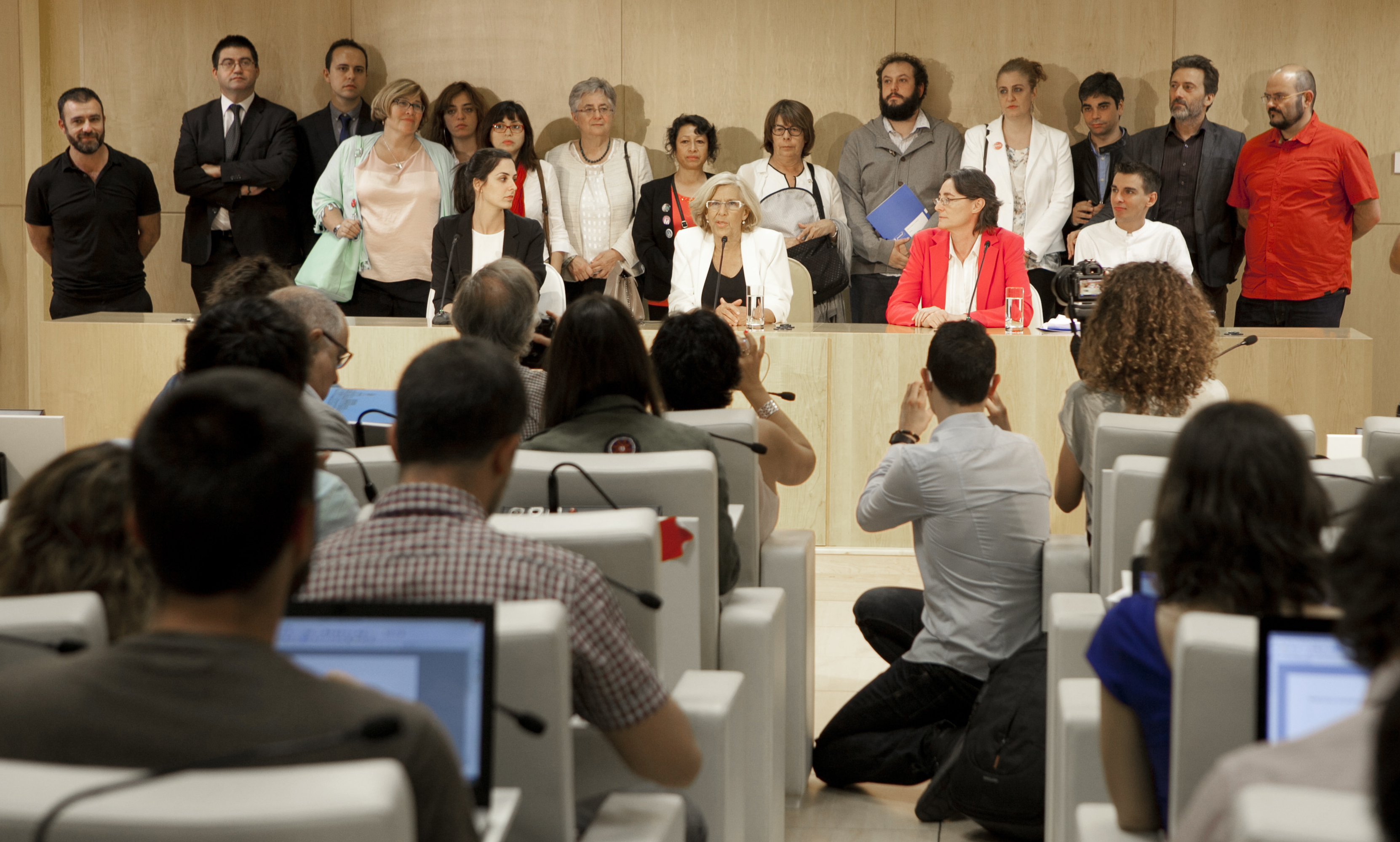 Manuela Carmena et son équipe municipale lors de l'investiture à la mairie de Madrid